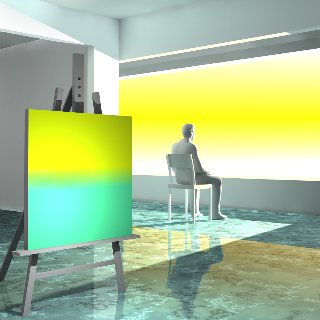 Cuadro del pintor vasco Koldo Etxabarria con el título "La belleza está en el que contempla".